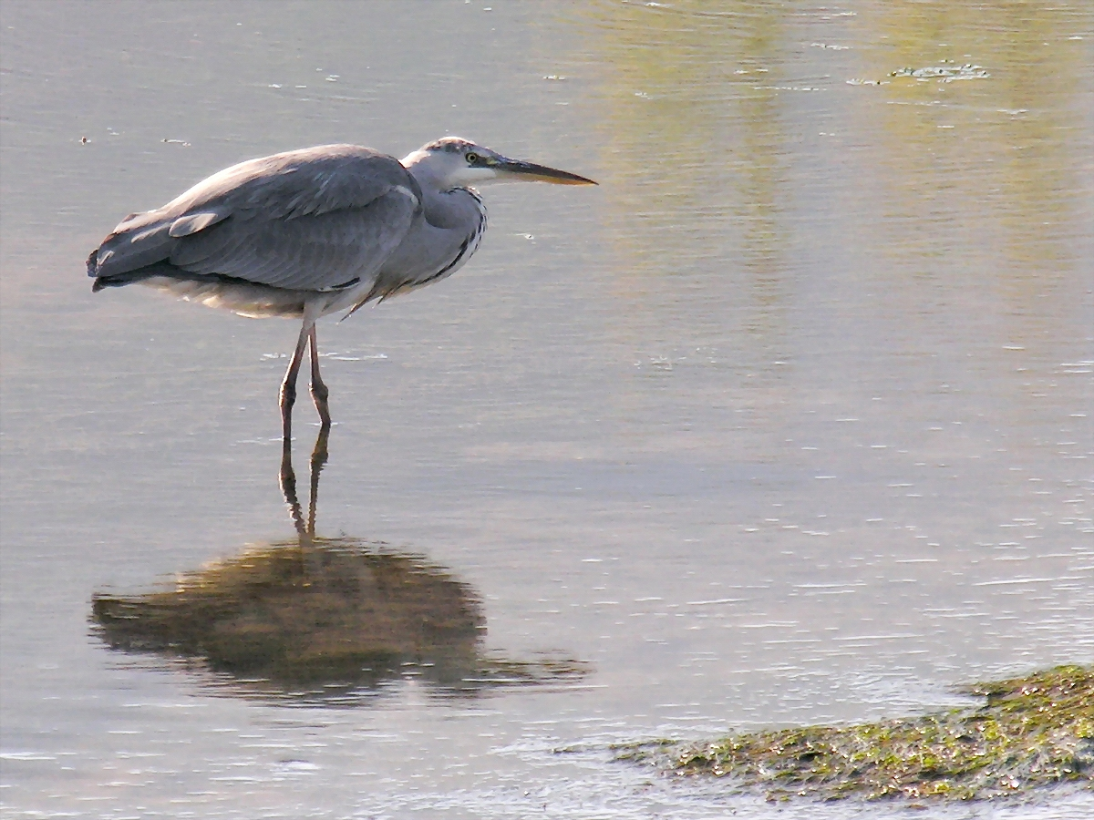 Ardea cinerea